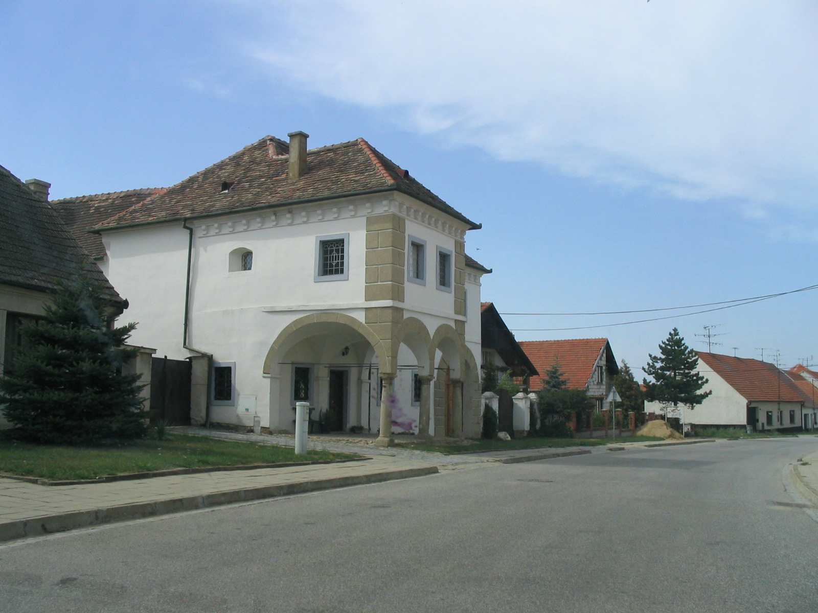 Pouzdřanský zámeček